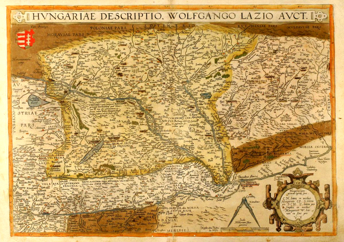 Original alt kolorierte Kupferstich Karte von Ungarn von A. Ortelius. Die Karte basiert auf der von 5 Platten gedruckte Wandkarte von Wolfgang Lazius aus dem Jahr 1556. Aus der deutschen Ausgabe des "Theatrum Orbis Terrarum" von 1580.